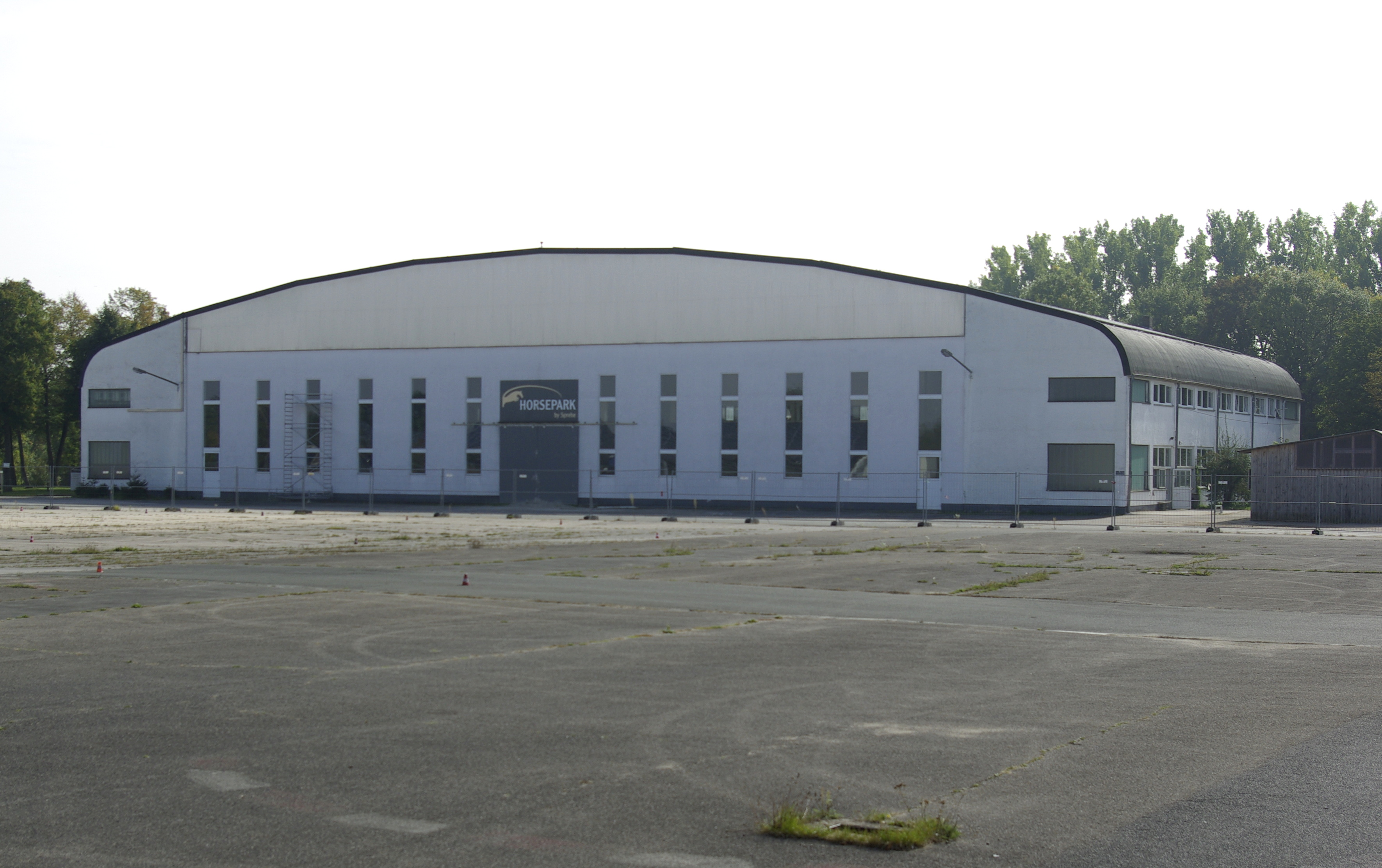 Ehemalige Flugwerft und Hangar (Gebäude Nr. 252) des ehemaligen Flughafens Nürnberg-Fürth in Fürth.